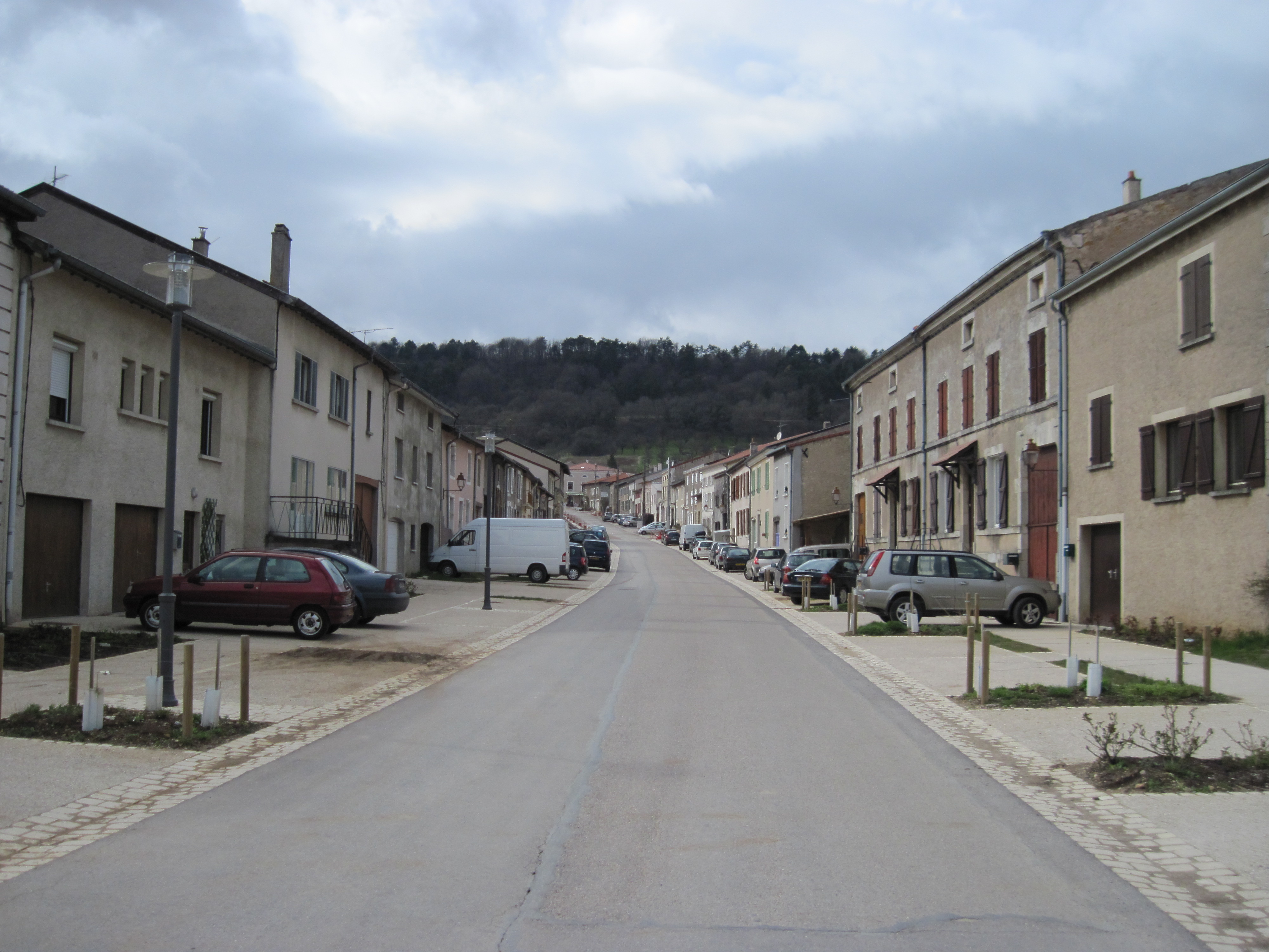 Rue de la République